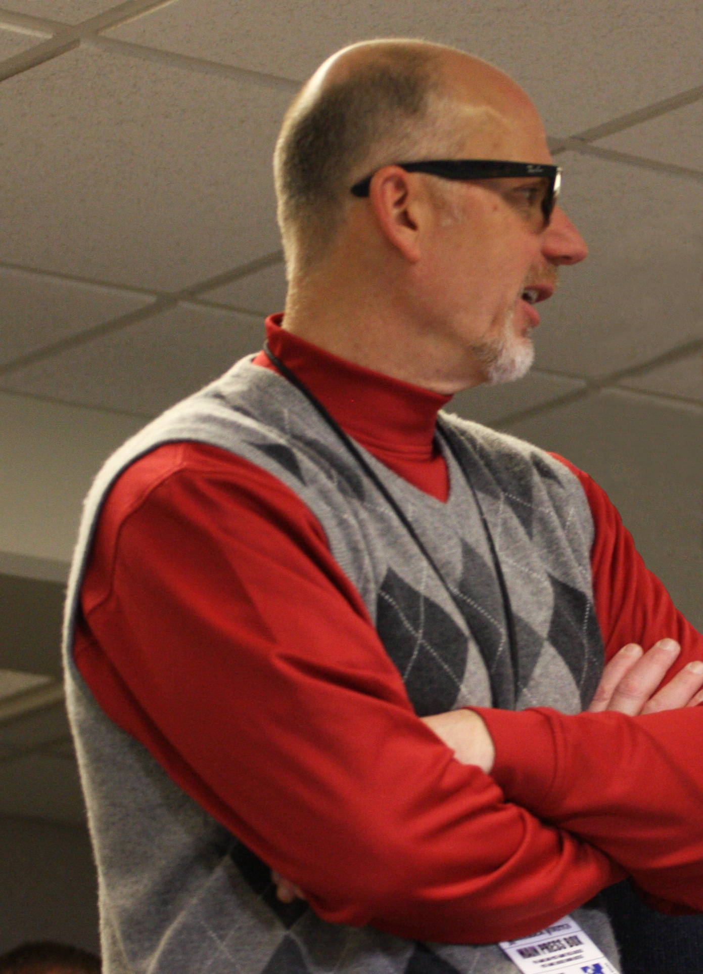 Gene Wojciechowski of ESPN in 2010.